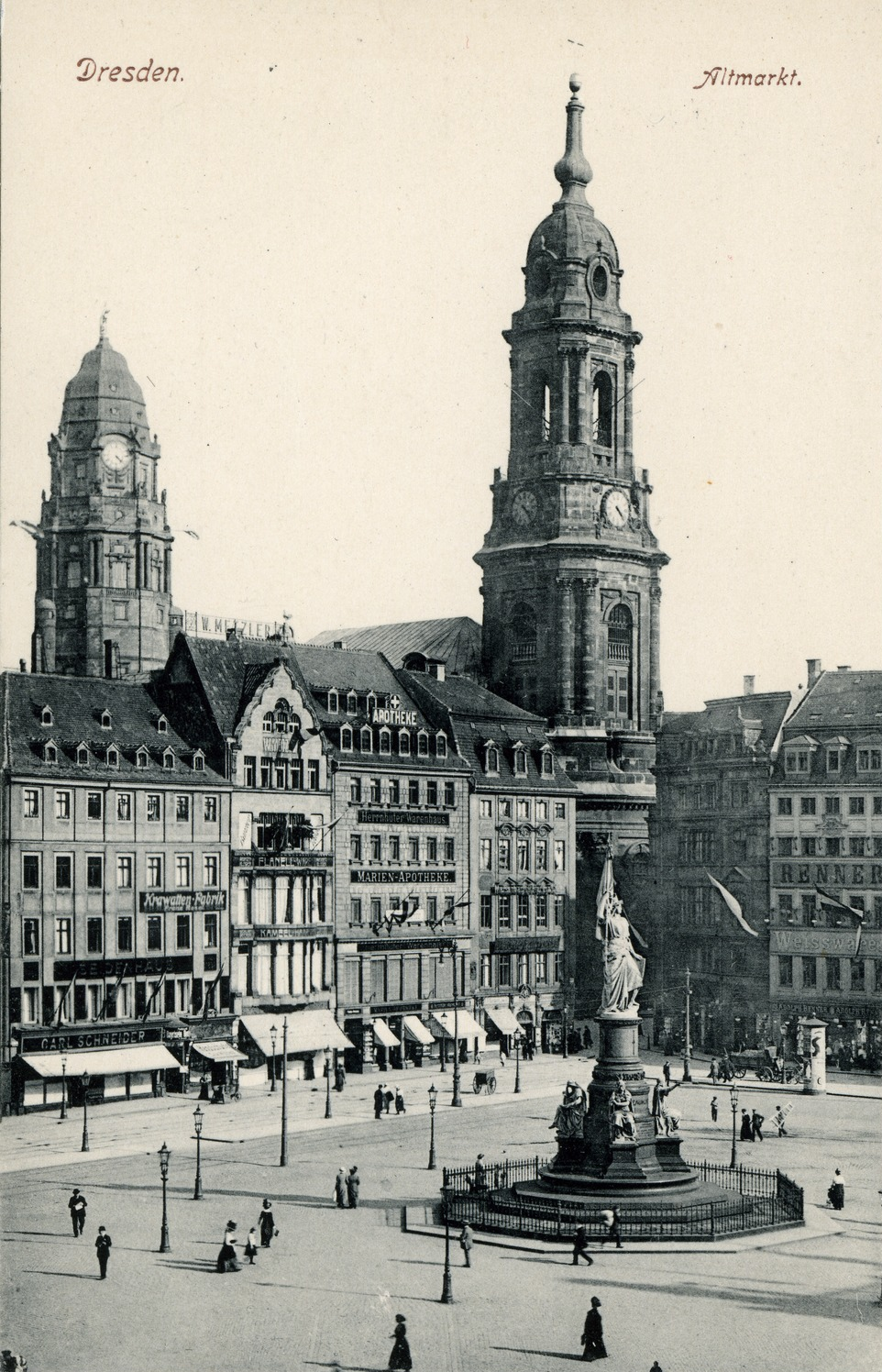 Dresden; Altmarkt This postcard is from publisher Brück & Sohn in Meißen ( postcard has a unique number 18900 and is available in a higher resolution at the publisher. This images was uploaded in a cooperation project between Wikipedians and the publisher.